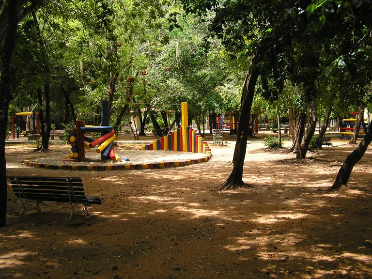 Parque infantil (Playground) em Parque das Dunas. Natal, Brasil.